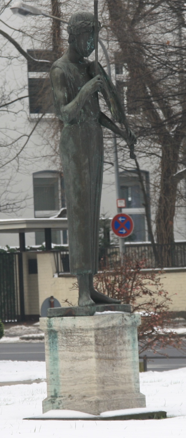 Orpheus-Statue an der Musikschule in Düre, NRW